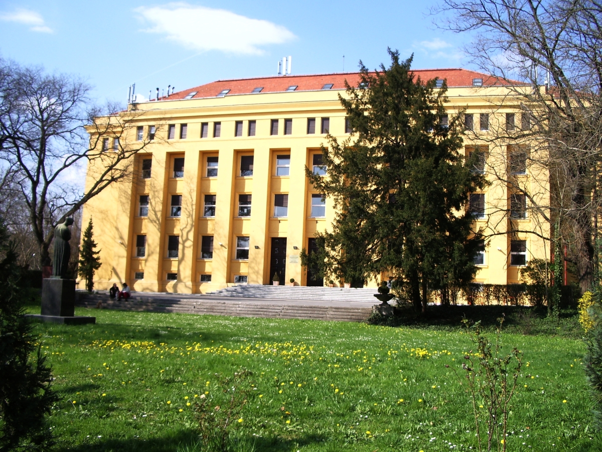 Škola narodnog zdravlja Andrija Štampar u Zagrebu